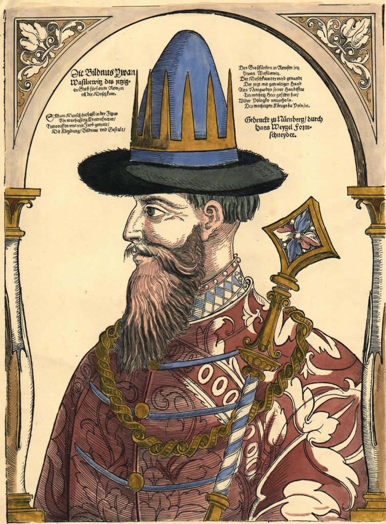 Ivan IV. European etchingю Гравюра на дереве Х.Вайгеля